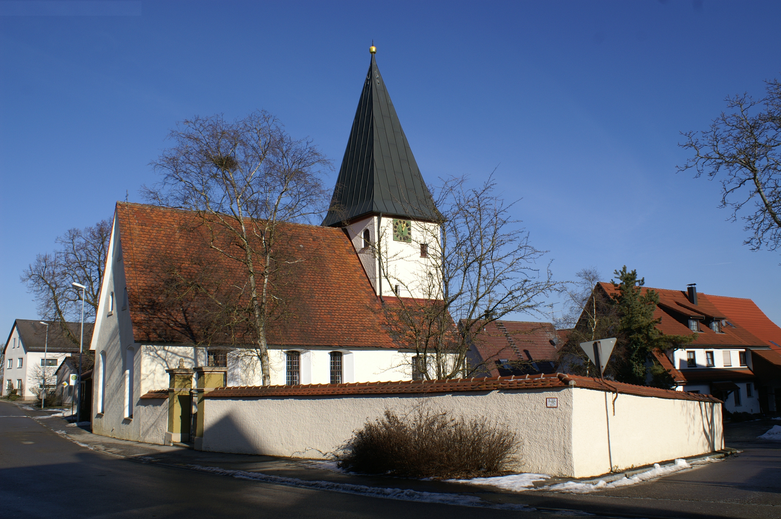 Evangelische Kirche in Reutti im Alb-Donau-Kreis